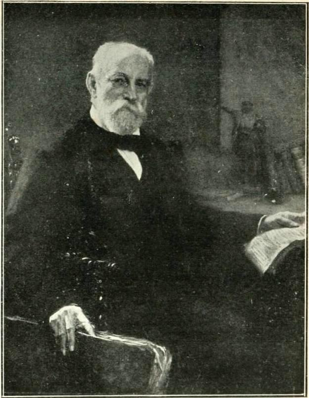 "Portrait de M. Henry Vignaud, chargé d'affaires de l'ambassade des États-Unis à Paris."